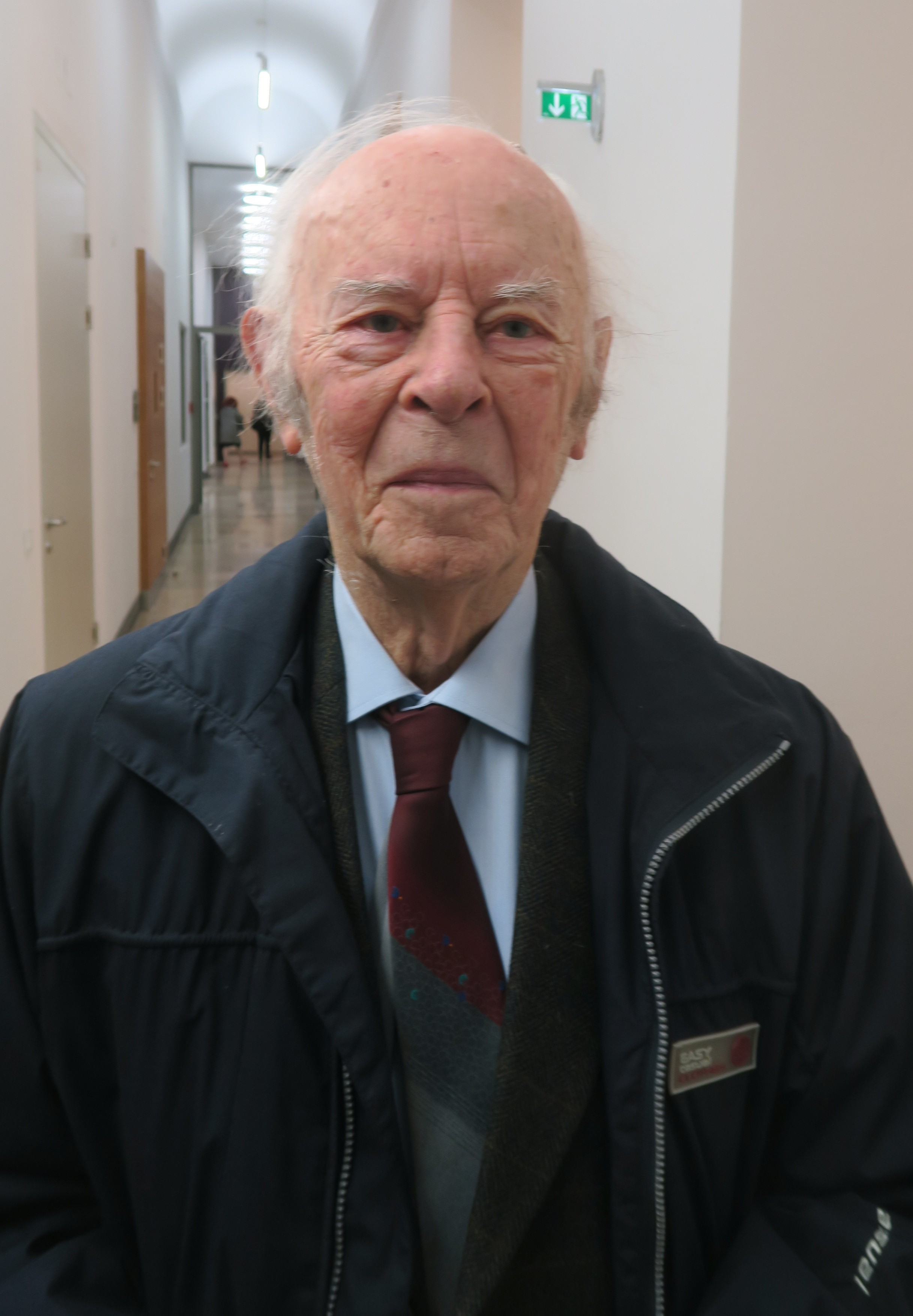 Hans Haselböck, Doyen der österreichischen Orgelkunst, 90 Jahre alt, beim Orgelsymposium in der Musikuniversität Wien, 20. Oktober 2018